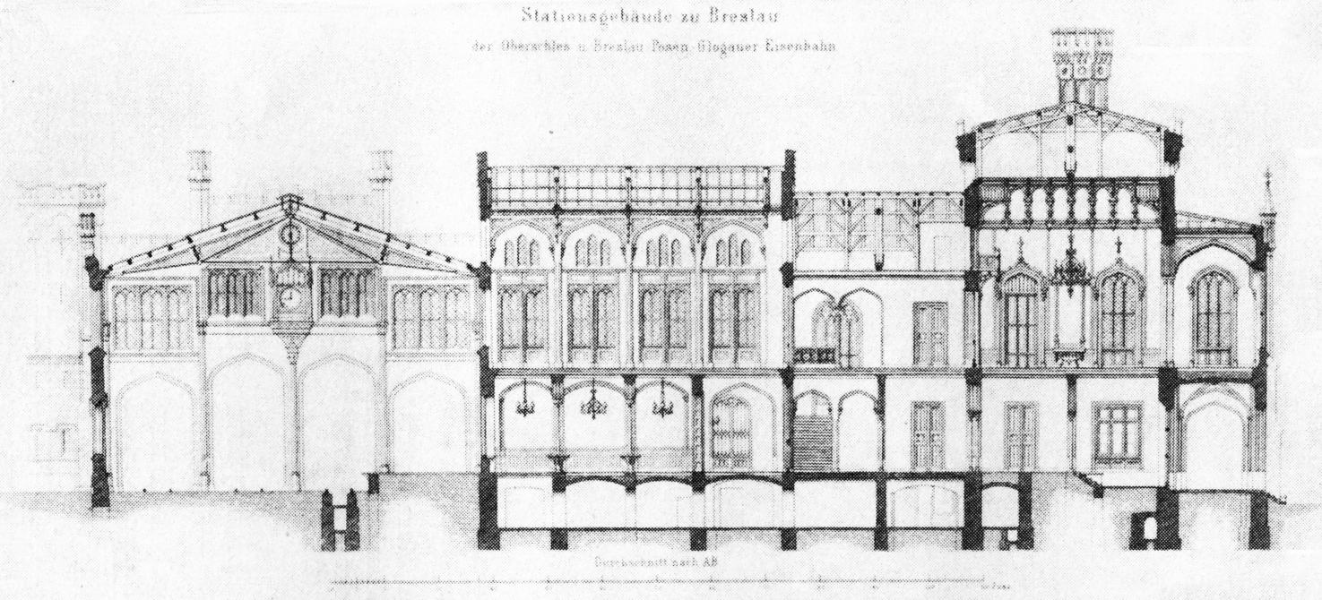 Wrocław. Drugi Dworzec Górnośląski przed przebudową - przekrój poprzeczny.